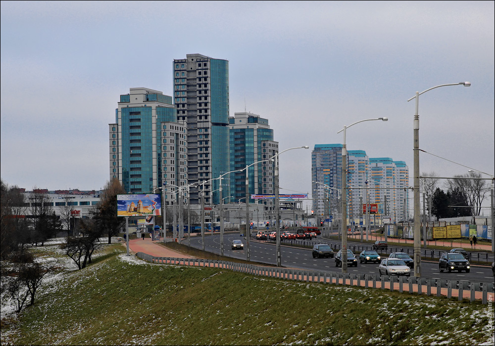 Замалёўкі Мінска.